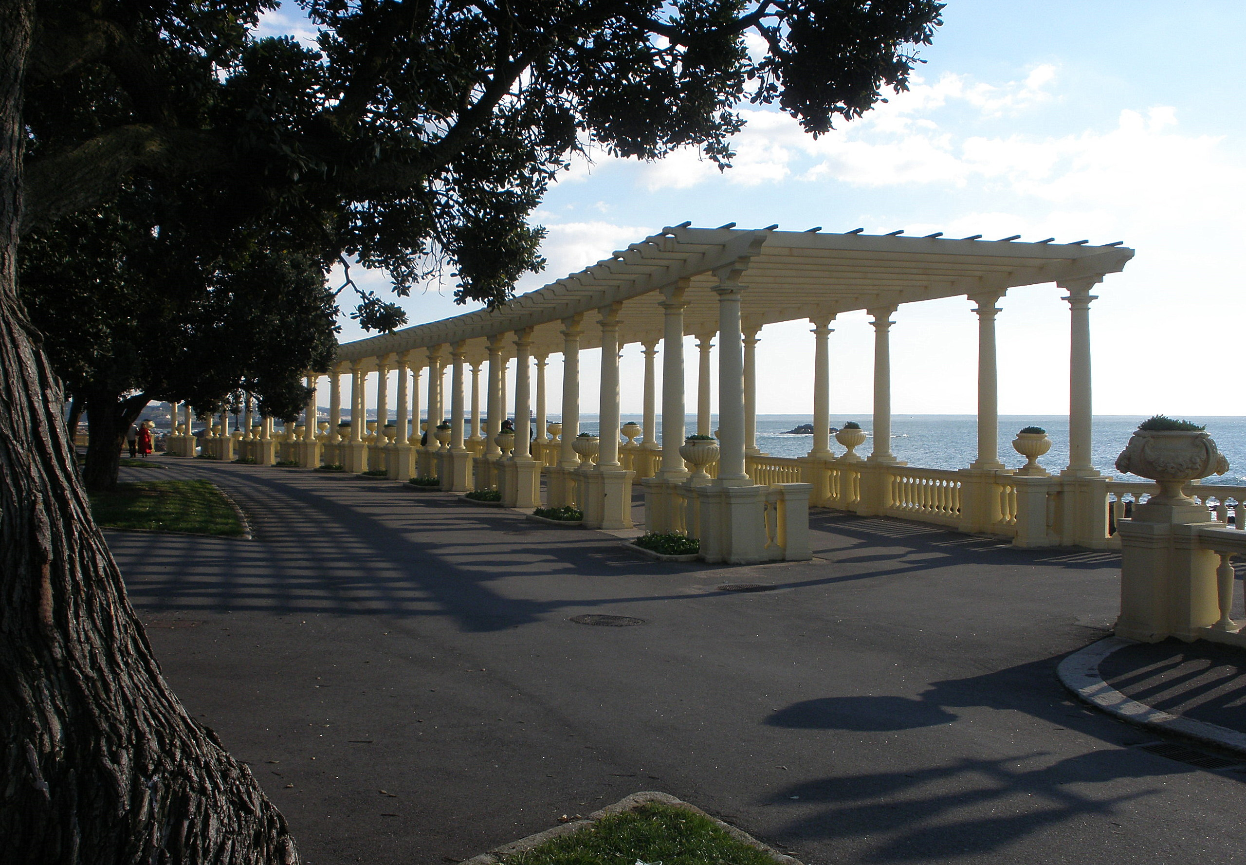 Pérgola da Foz, Nevogilde, Porto, Portugal. This file was uploaded for Wiki Loves Monuments in Portugal with the unique identifier 5194590.